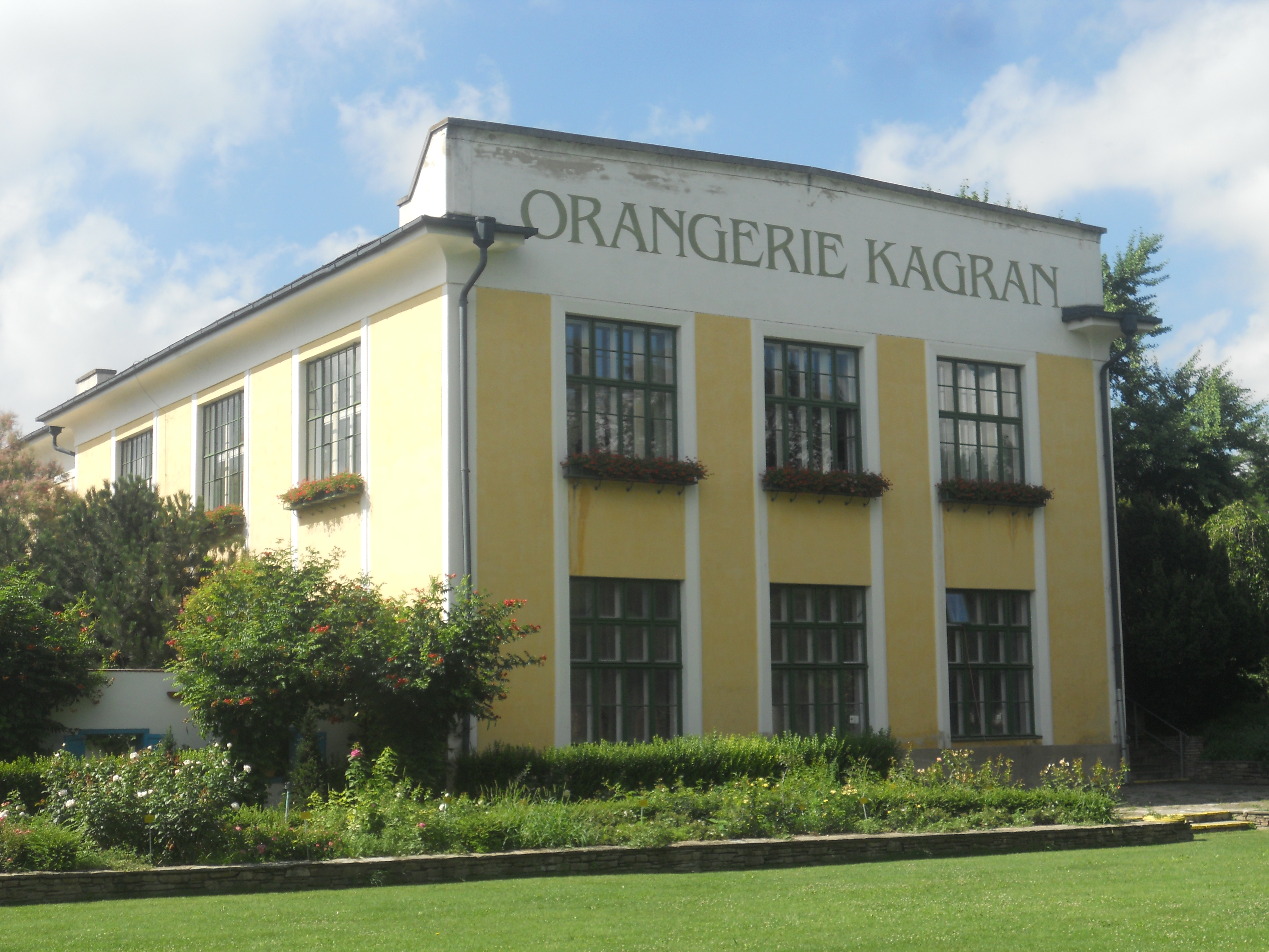 Schulgarten Kagran, ehem. Orangerie (Österreichisches Gartenbaumuseum)